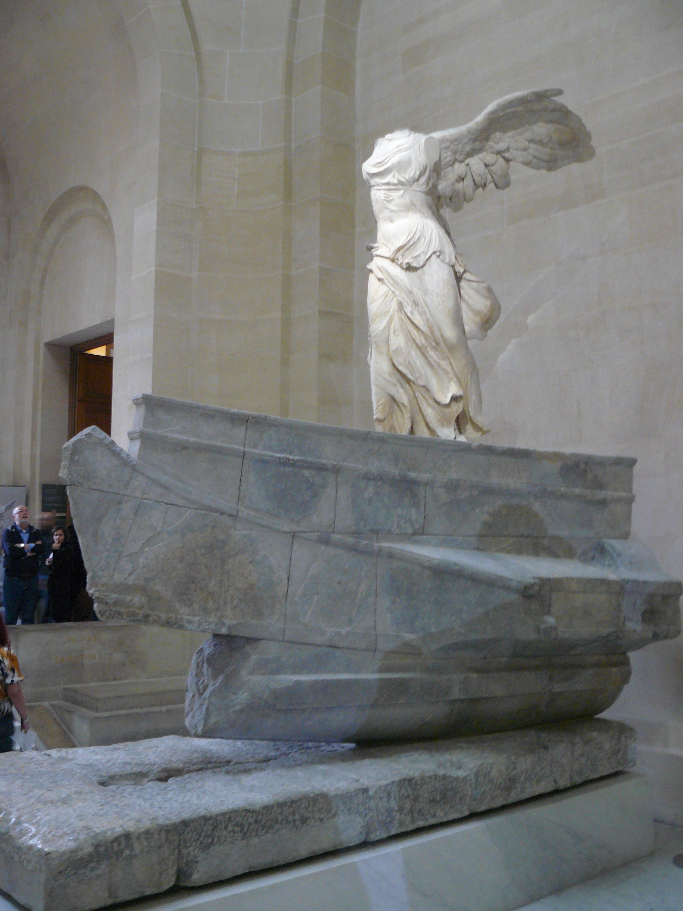 Vue globale sans foule montrant la statue avec sa base et la proue.